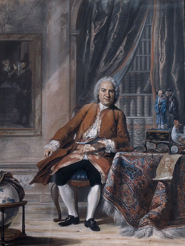 Joan Jacob Mauricius (1692-1768). Gouverneur-generaal van Suriname, dichter en toneelminnaar.[1] Alternative title(s): Portret van Jan Jacob Mauricius (1692-1768).[2]